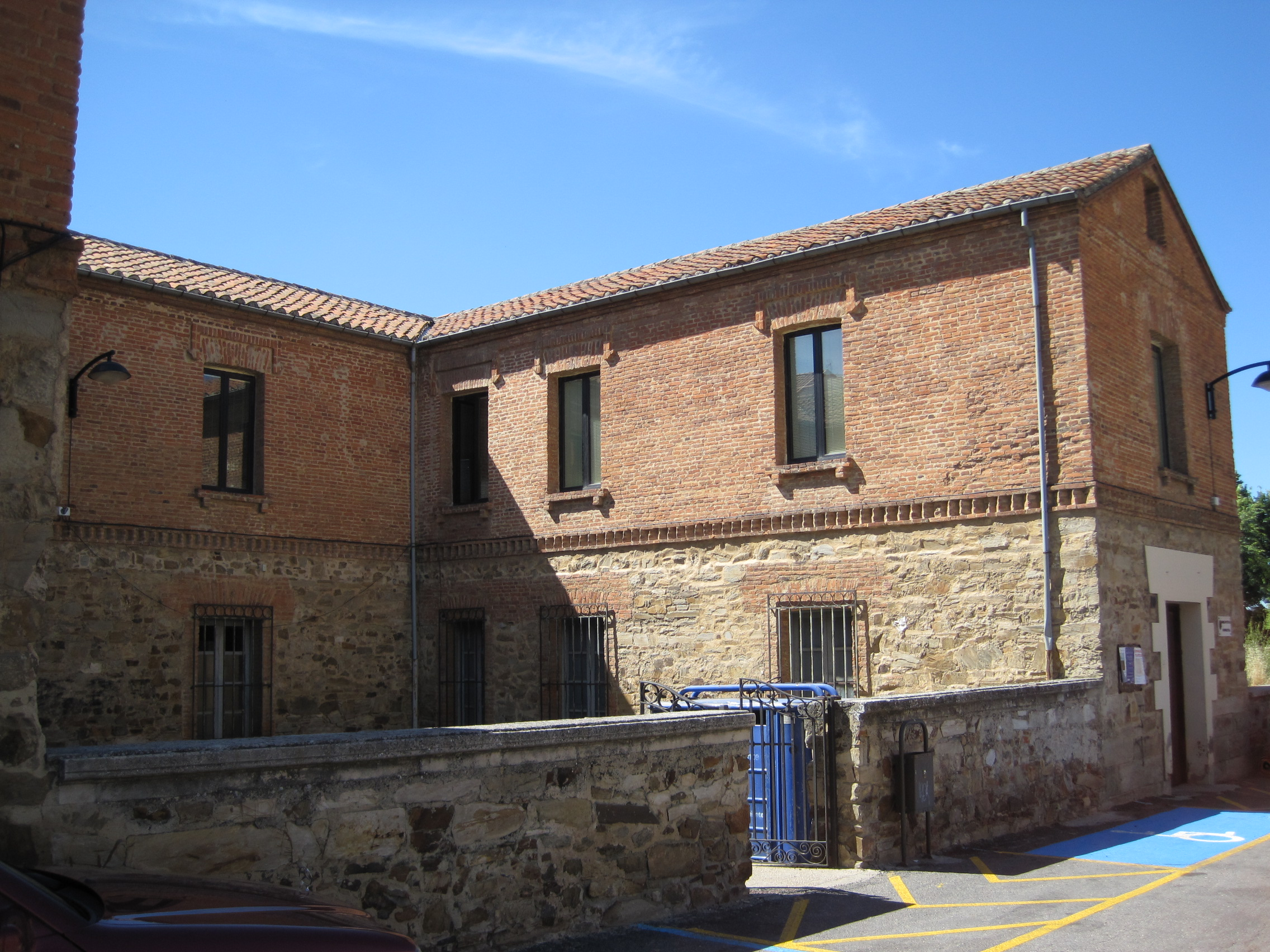 Vista parcial de la biblioteca municipal de Astorga (León, España).